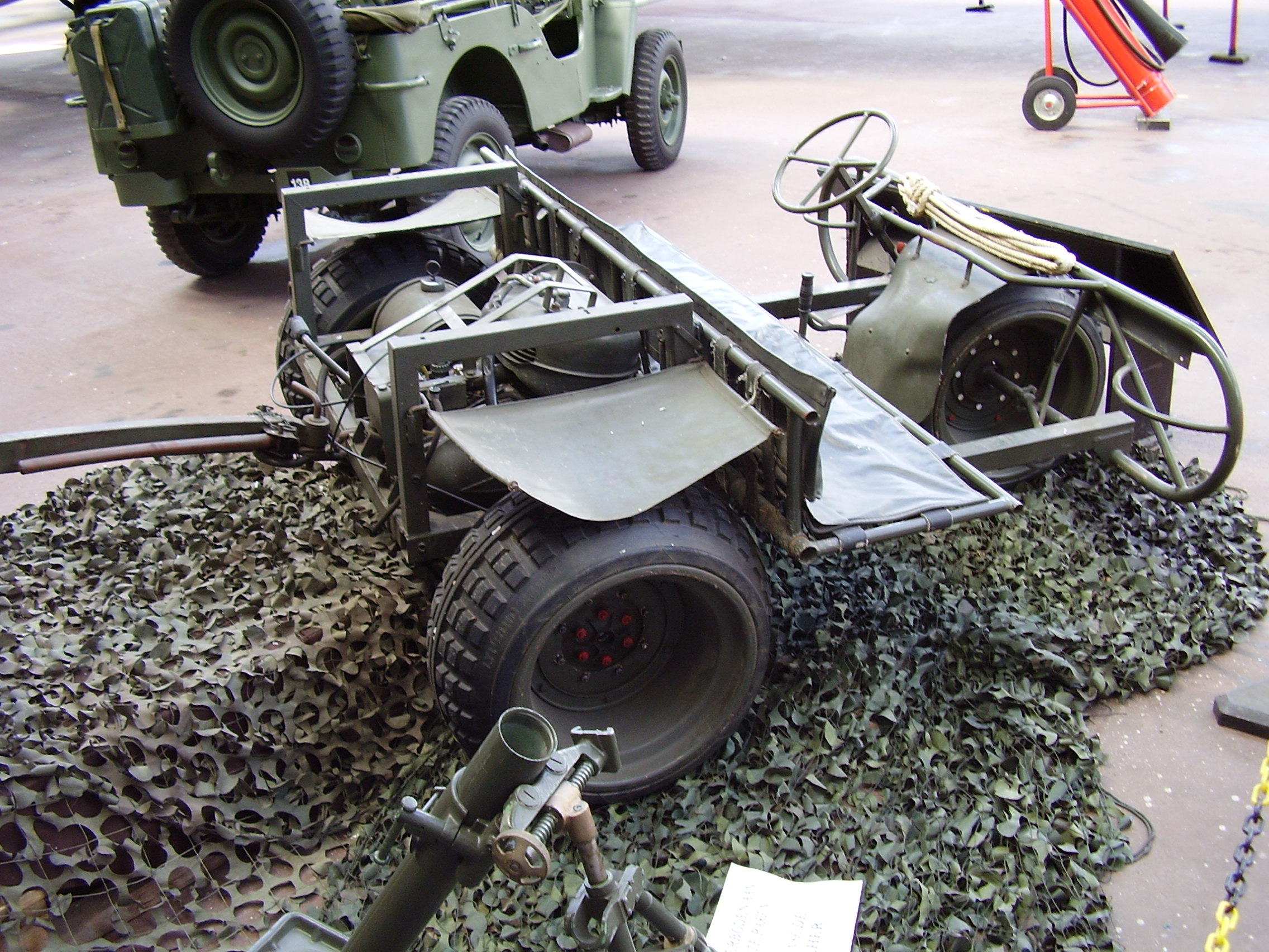 Royal Military Museum Brussels, Musée Royal de l'Armée, Koninklijk Museum van het Leger en de Krijgsgeschiedenis, AS 24 (produced by FN Hesral), discription in image Image:Royal Military Museum Brussels 2007 335.JPG